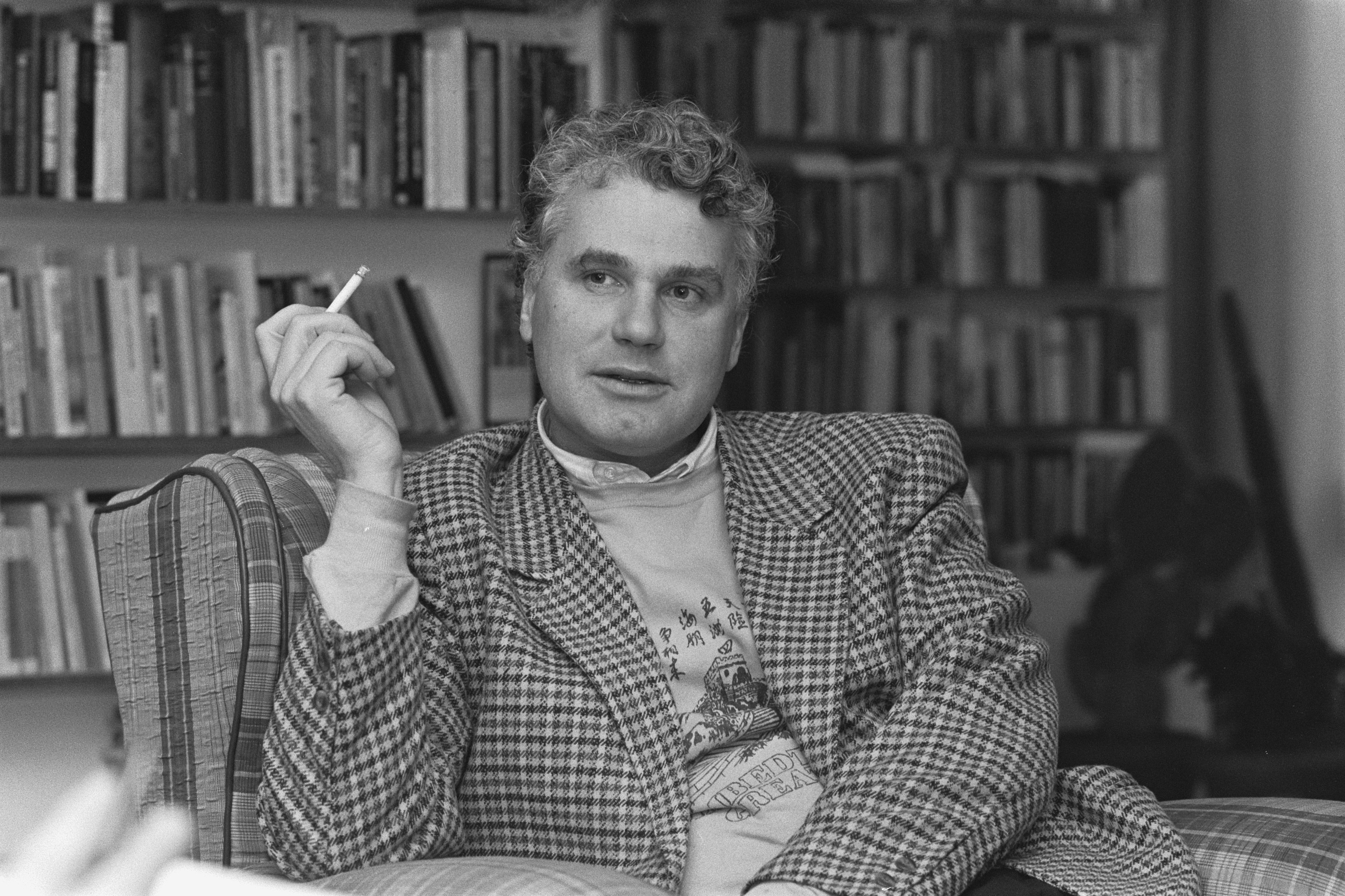 Adriaan van Dis, 19 november 1986